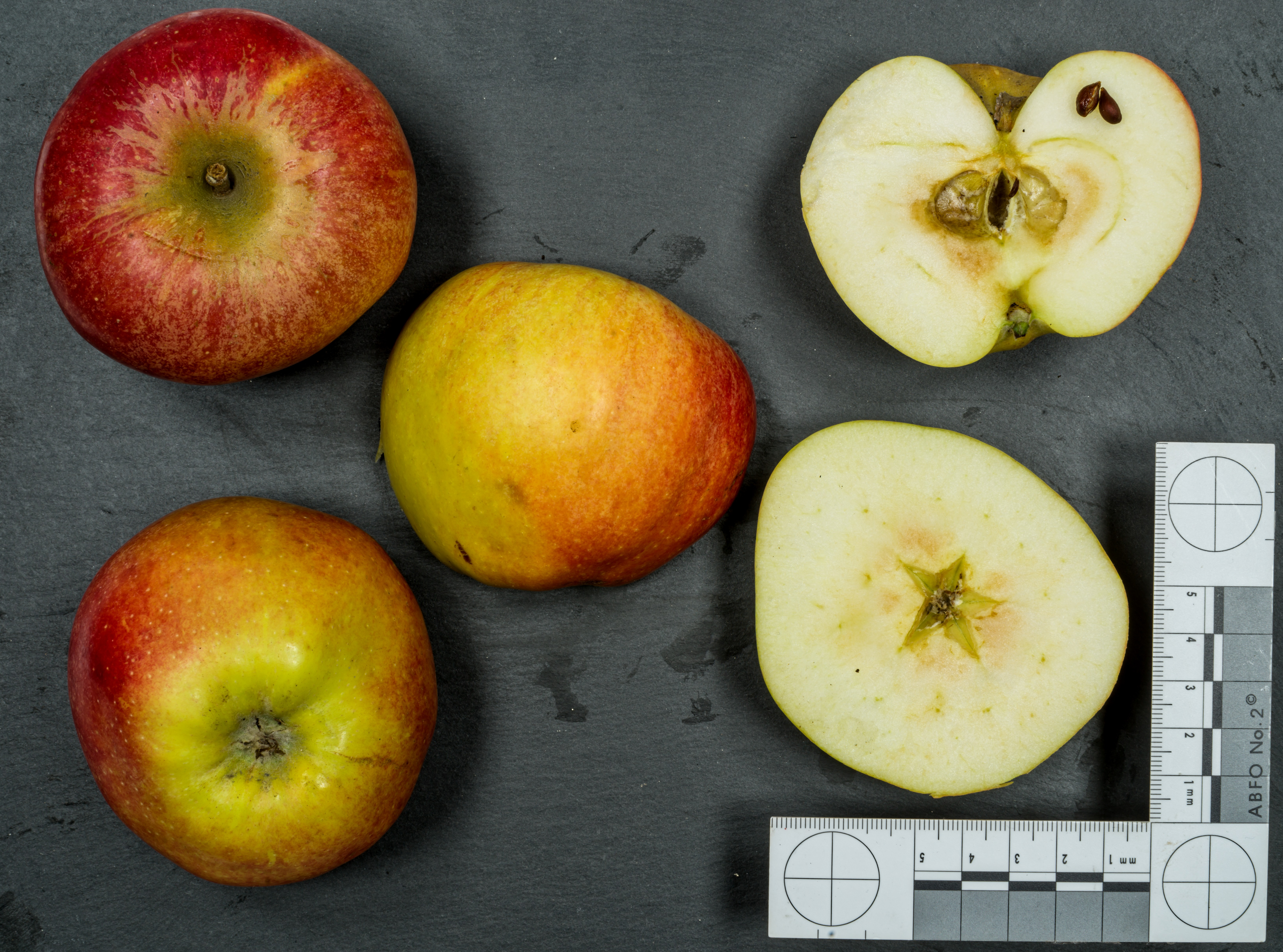 Apfelsorte: Horneburger Pfannkuchenapfel, Horneburger, Horneburger Pfannkuchen, Horneburger Pancake Vielen Dank an den Herzapfelhof Lühs in Jork, Altes Land, Deutschland für die freundliche Unterstützung